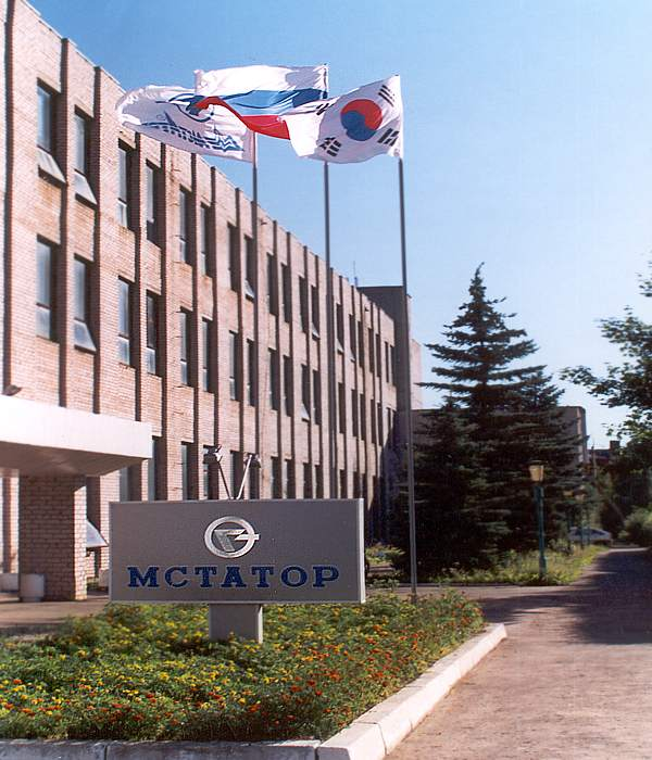 ОАО "Мстатор"